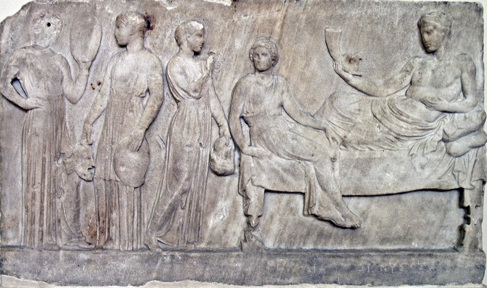 Relief votif en marbre, trouvé au Pirée. Dionysos est montré allongé sur une couche (klinè), tenant un rhyton et une phiale. Au pied de la couche se tient une femme, Paideia, tournée vers un homme qui tient un masque de théâtre dans la main gauche. Deux acteurs sont présents, l'un tient un tympanon et l'autre un masque et un tympanon. Le relief fut dédié par les acteurs au dieu Dionysos après une représentation théâtrale, peut-être les Bacchantes d'Euripide. Vers 400 av. J.-C. Musée archéologique national, Athènes, n°1500.